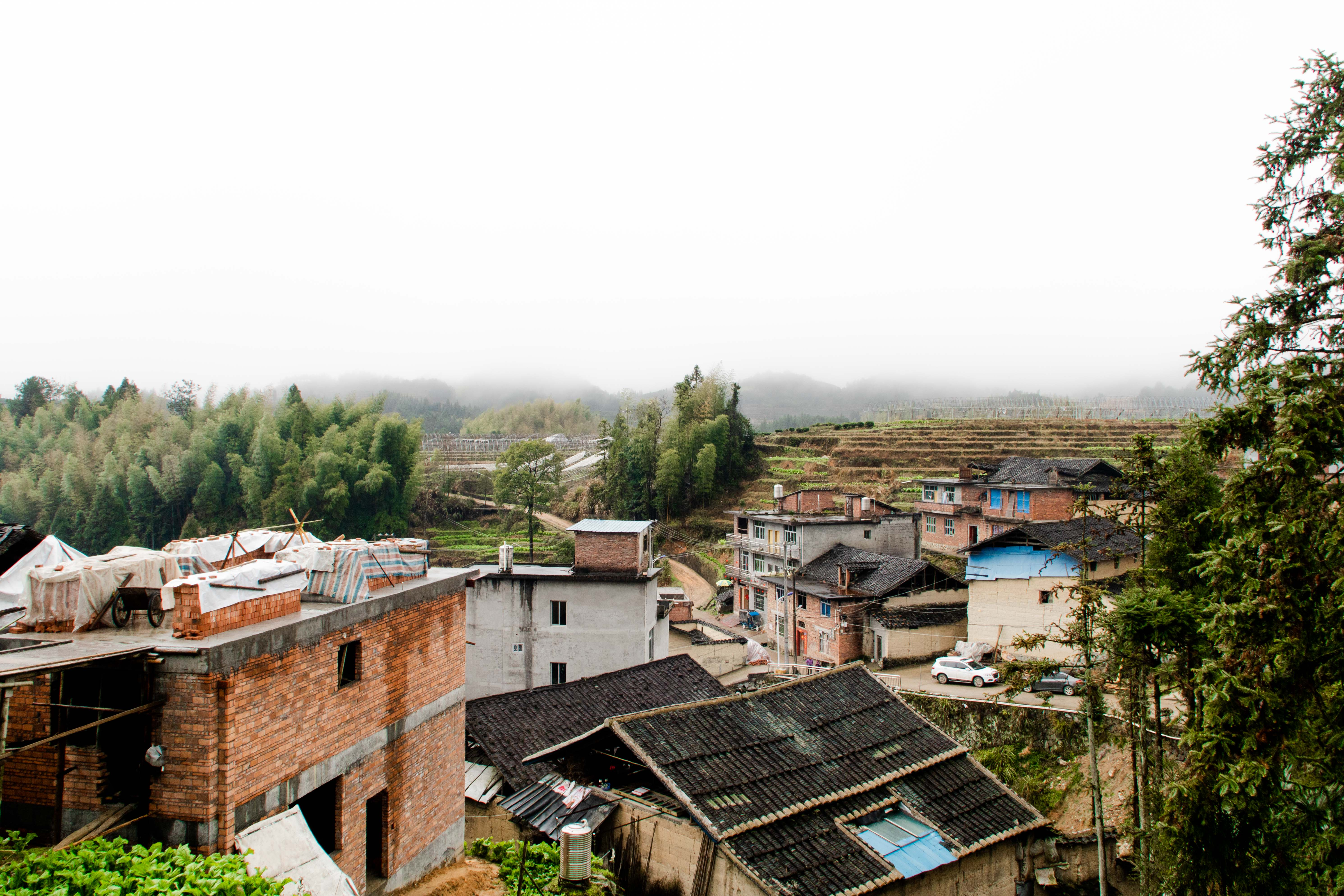 中文（中国大陆）: 凤阳乡基德村